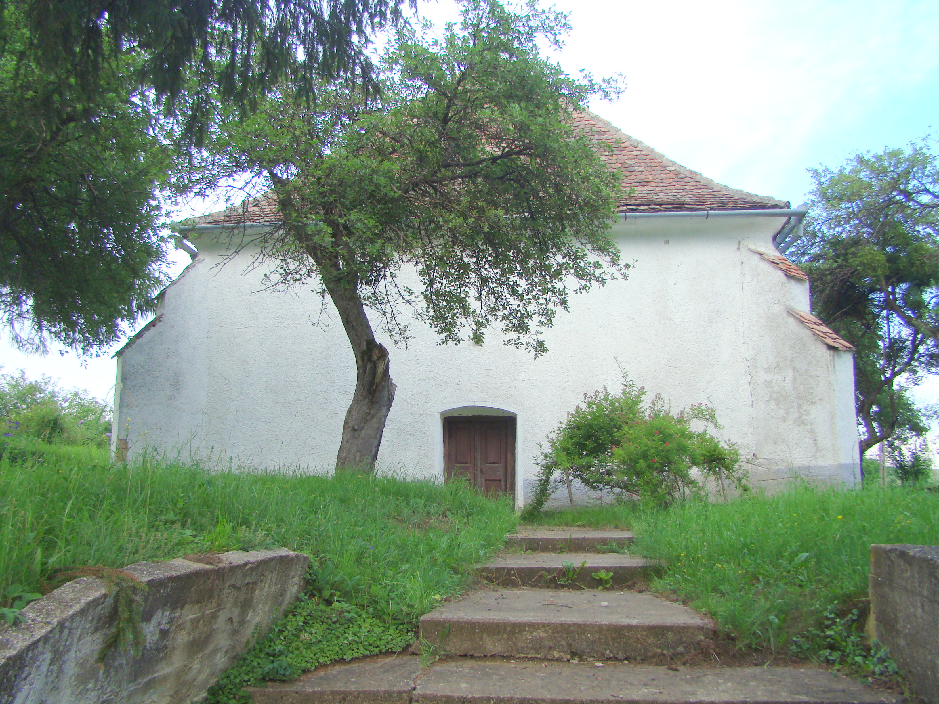 Biserica reformată, sat Grânari; comuna Jibert, în cimitirul reformat sec. XVII